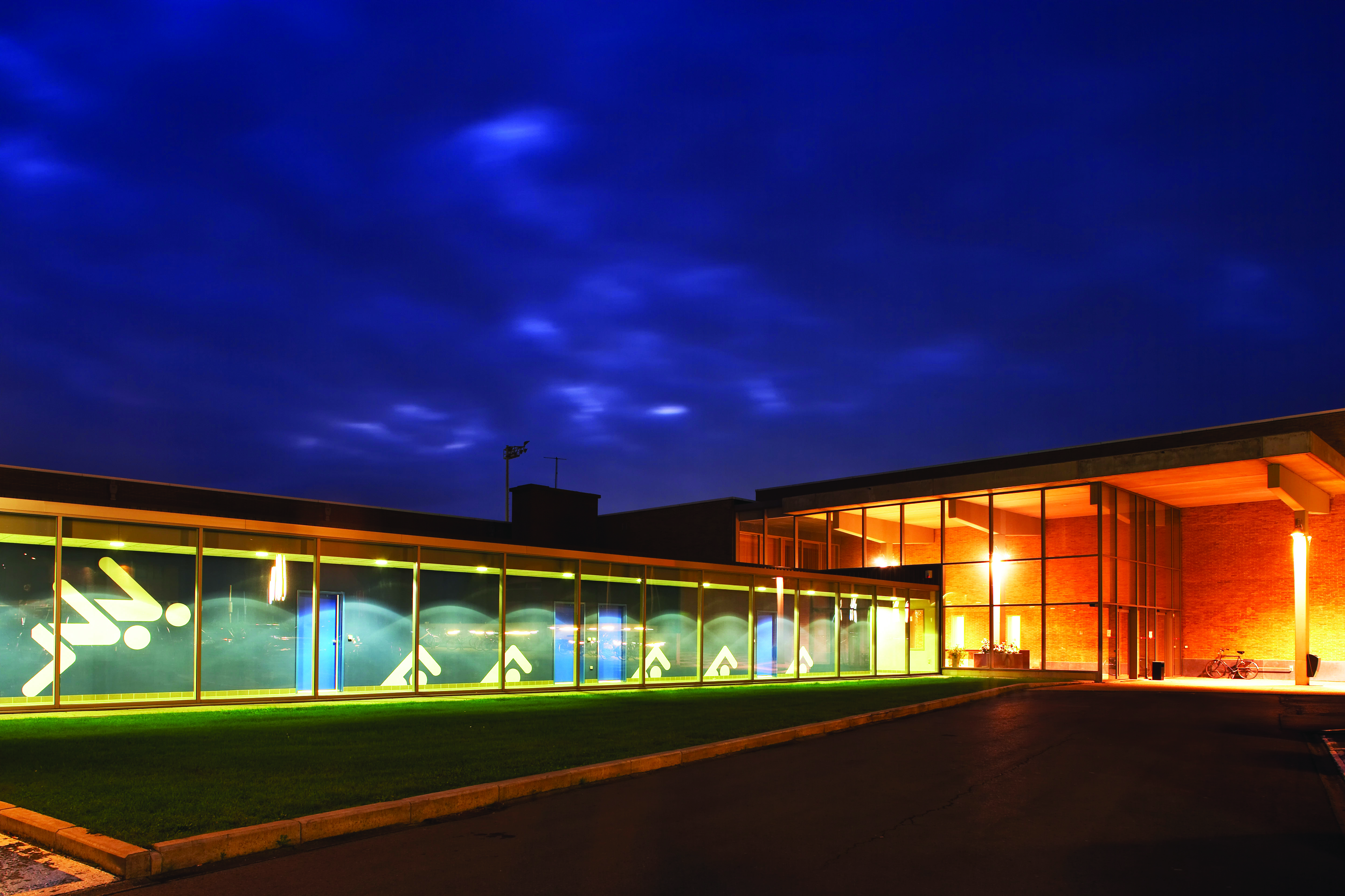 Sportpark